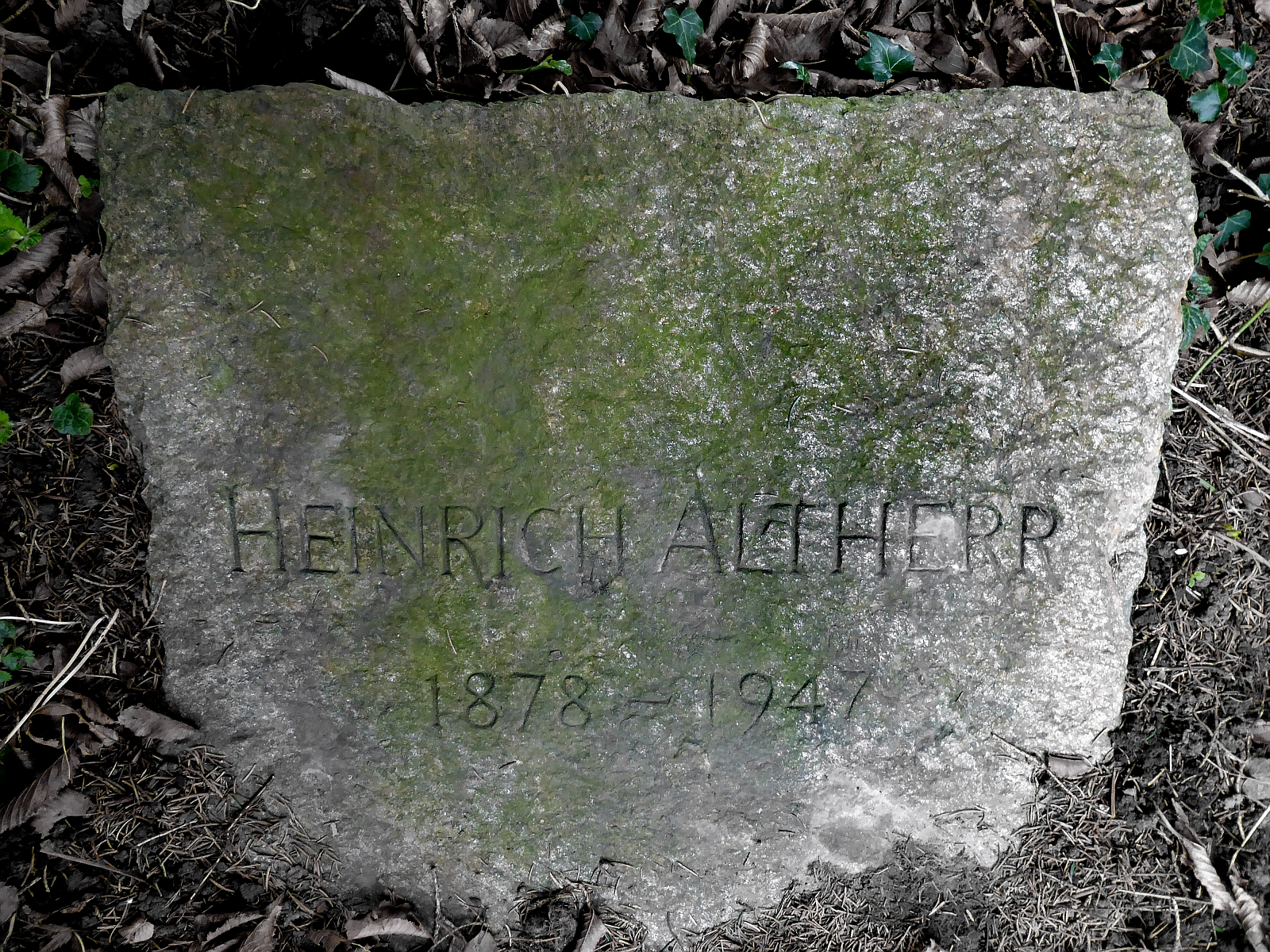 Heinrich Altherr-Fauser (1878–1947) Kunstmaler, Portrait, Fresken, Glasmalerei. Grab links vor dem Wandfresko Wandfresko «Das Jüngste Gericht». auf dem Friedhof am Hörnli, Riehen, Basel-Stadt